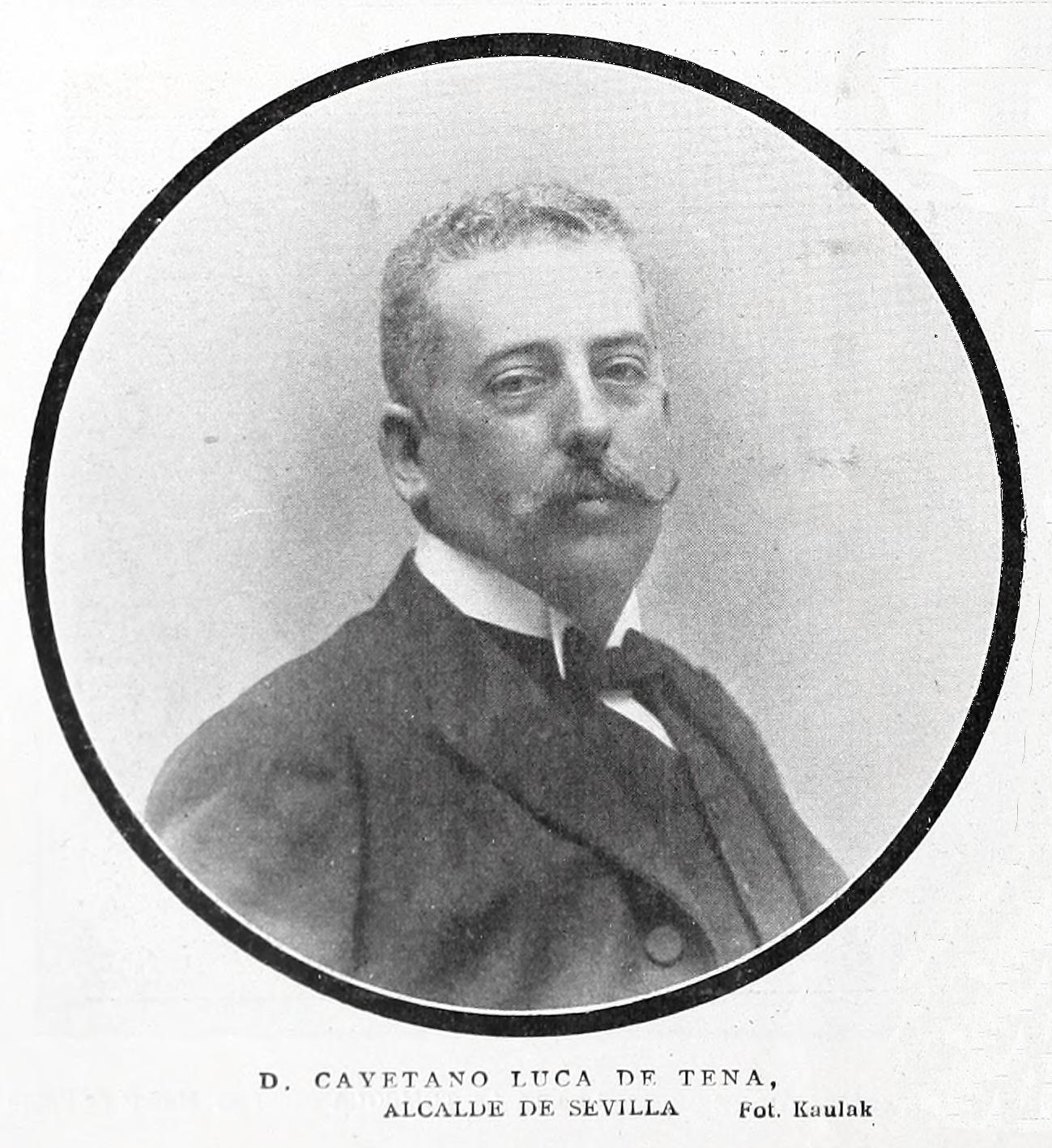 Cayetano Luca de Tena, alcalde de Sevilla.